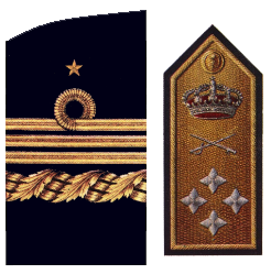 Divisas de Almirante General de la Armada española (pala y bocamanga izquierda)